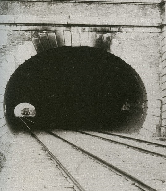 1874年開業時の芦屋川隧道、芦屋市役所の広報より許可を得て撮影